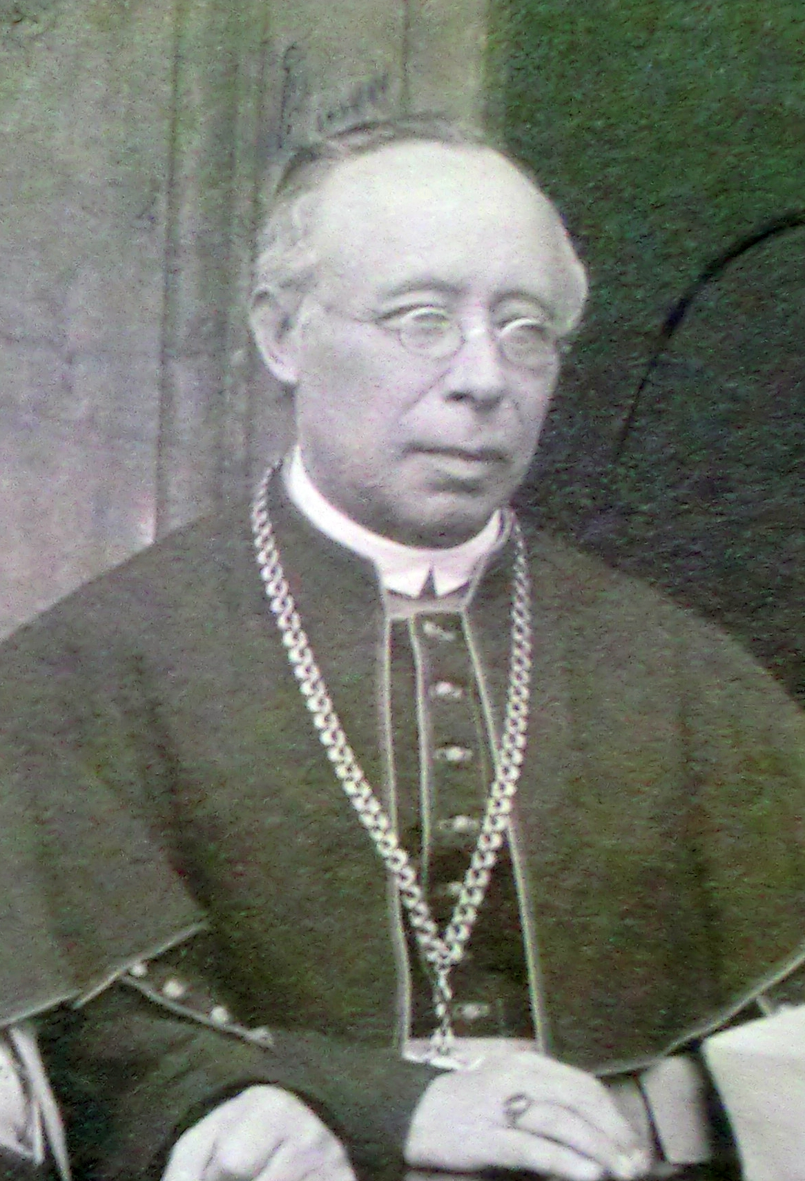 Kanovník Josef Štěrba při setkání kapituly s litoměřickým biskupem Emanuelem Schöblem (cca 1904)